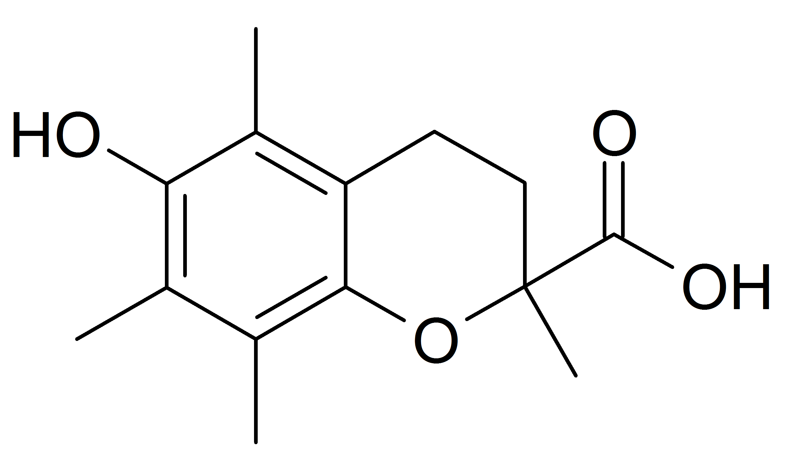 Strukturformel Trolox